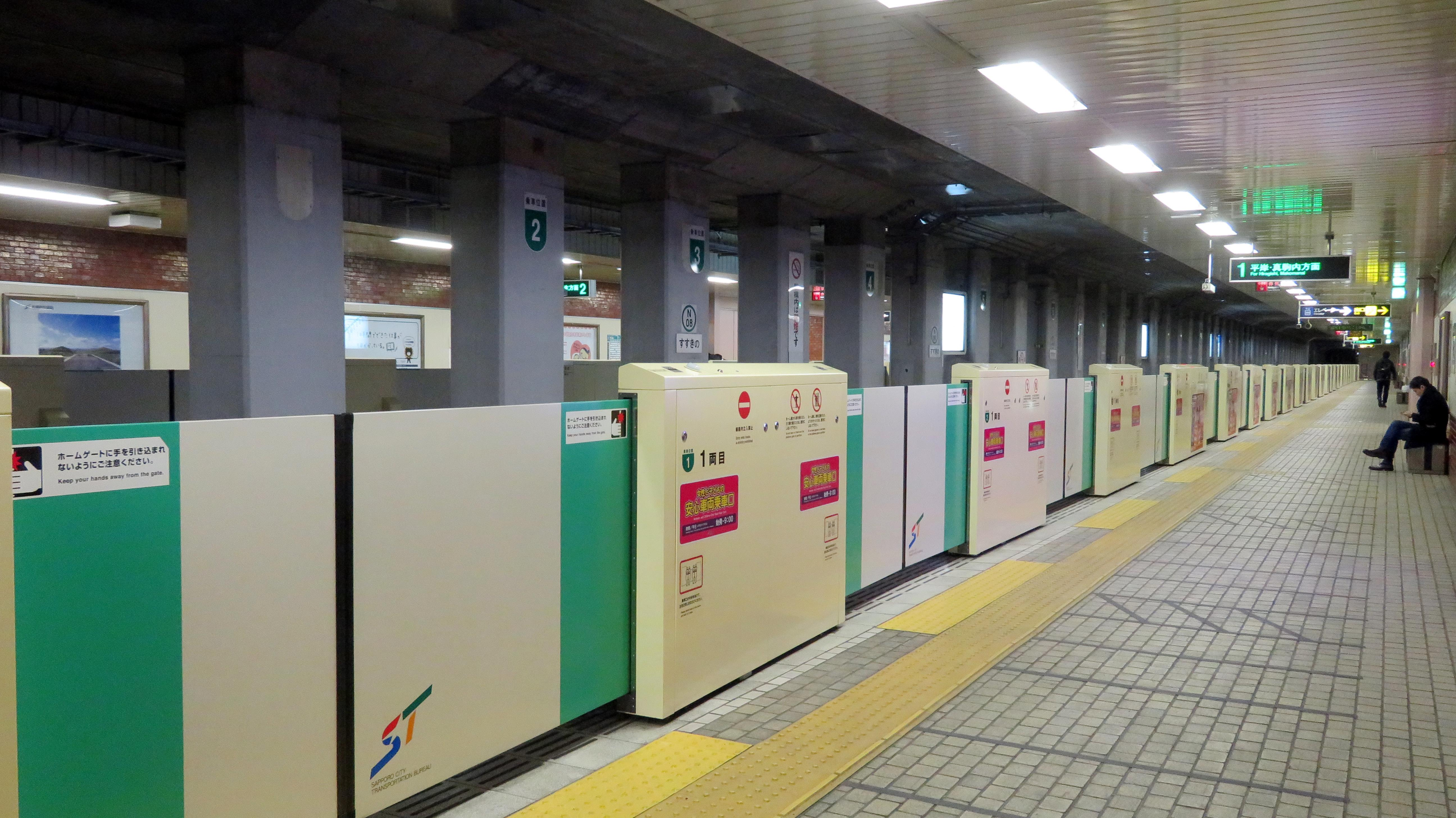 すすきの駅ホーム Canon PowerShot SX720 HS